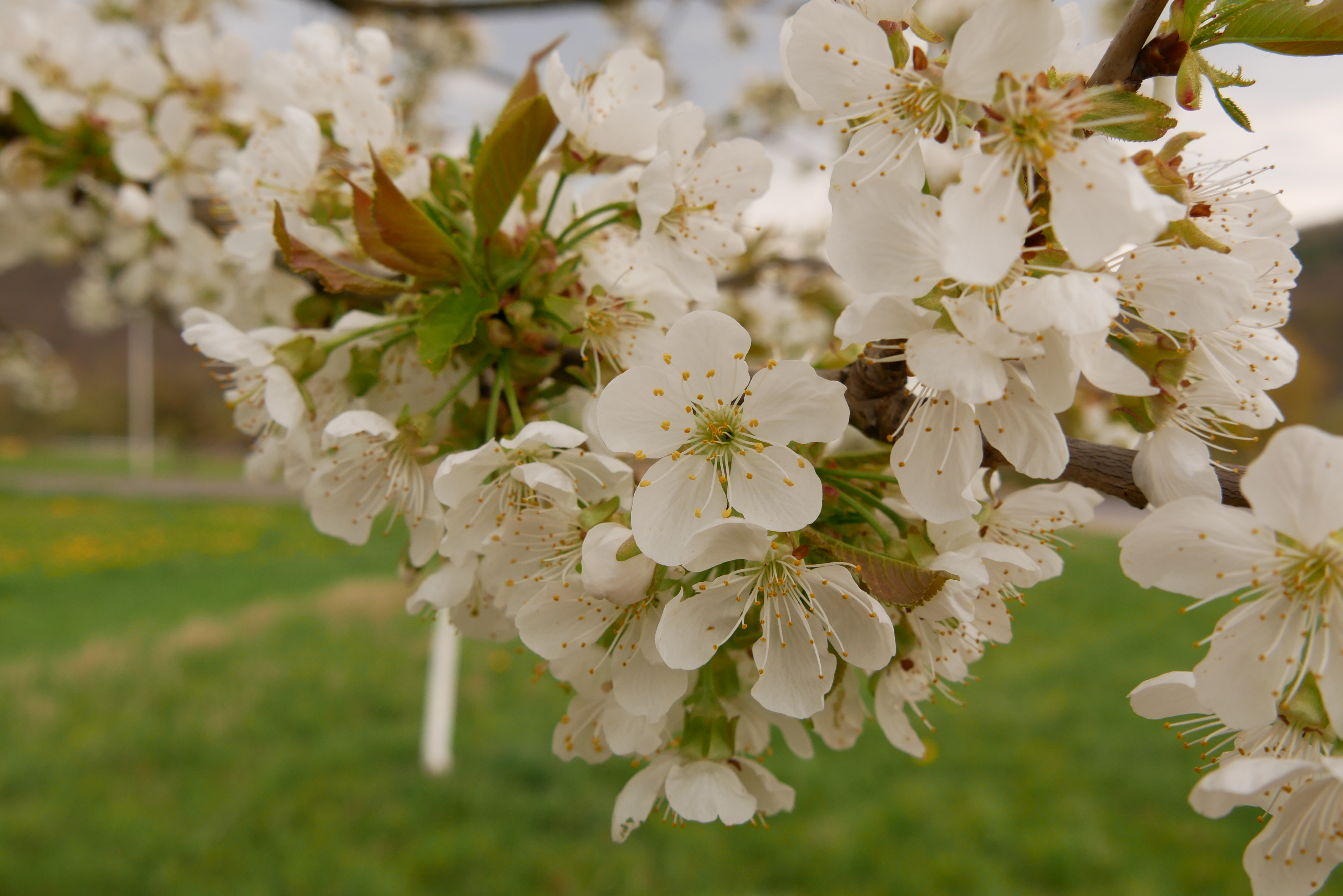 Blüte einer Süßkirsche, Sorte vmtl. Schneiders späte Knorpelkirsche